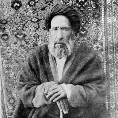 سیدحسن مدرس